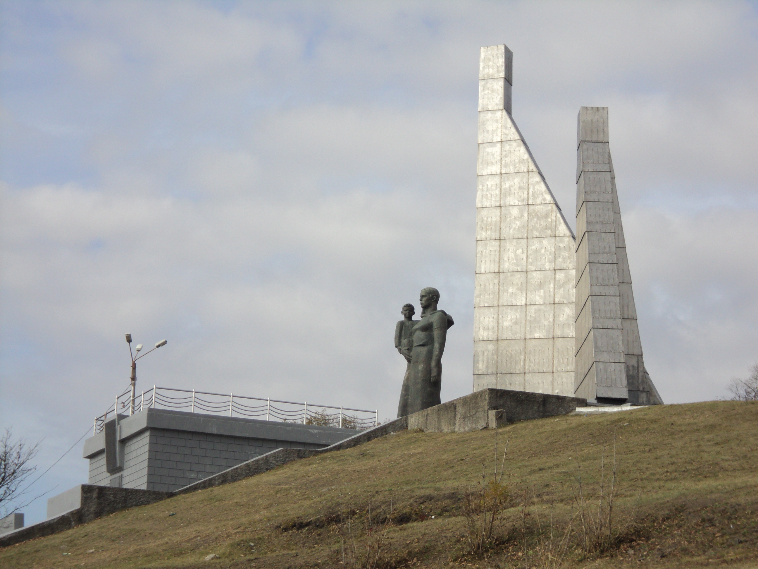 Скорбящая мать осенью